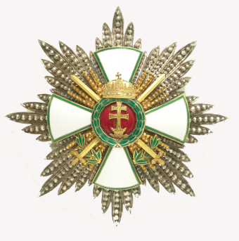 Magyar Érdemrend Szent Koronával ékesített nagykeresztjének csillaga hadidíszítménnyel és kardokkal